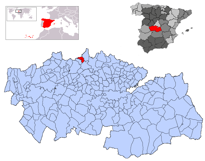 Paredes de Escalona en la provincia de Toledo